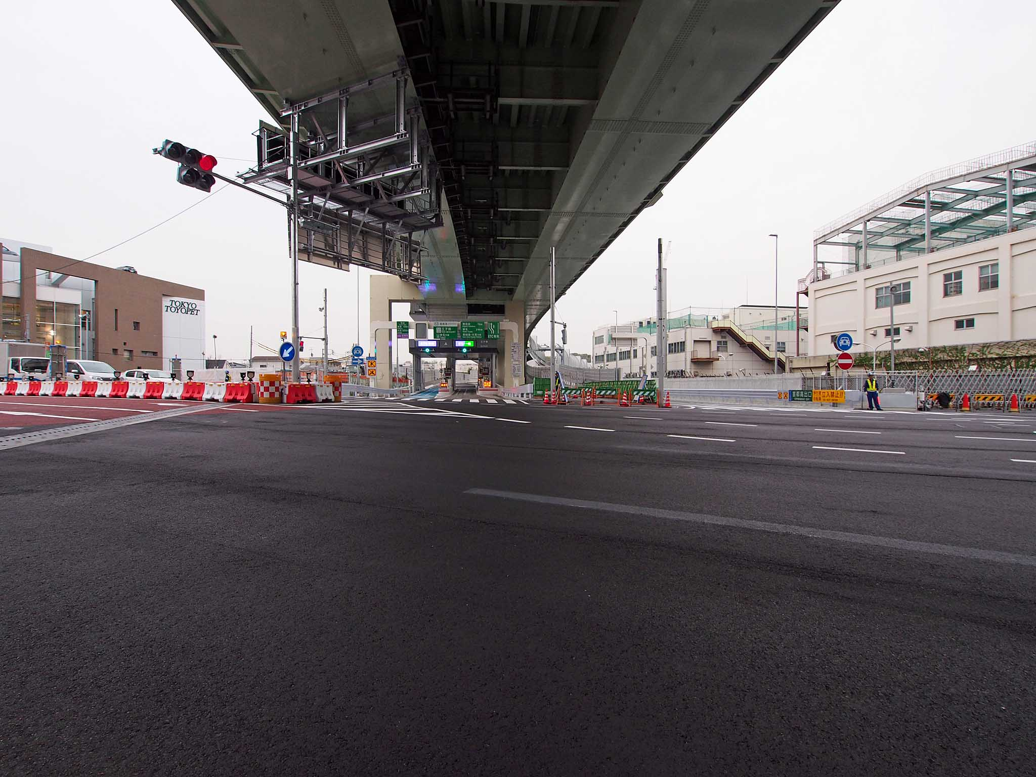 2015年に開業した首都高速道路・中央環状線の王子南インターチェンジ。明治通りに接しており、外回りからの出口と内回りへの入り口がある。左の側道を入るとJR王子駅南口に至り、羽田空港行きのリムジンバスと一部の高速バスが発着する。